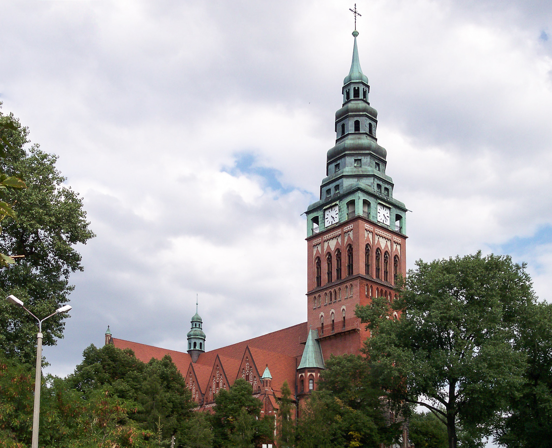 Kościół św. Bartłomieja w Gliwicach